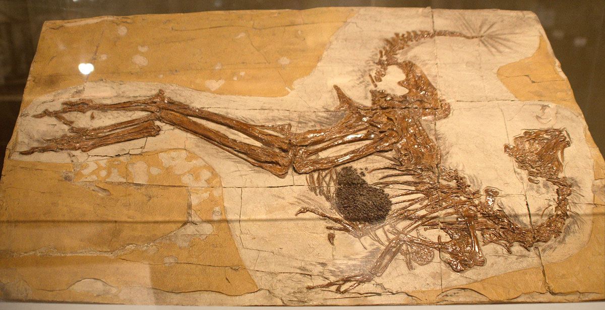 Caudipteryx - 01